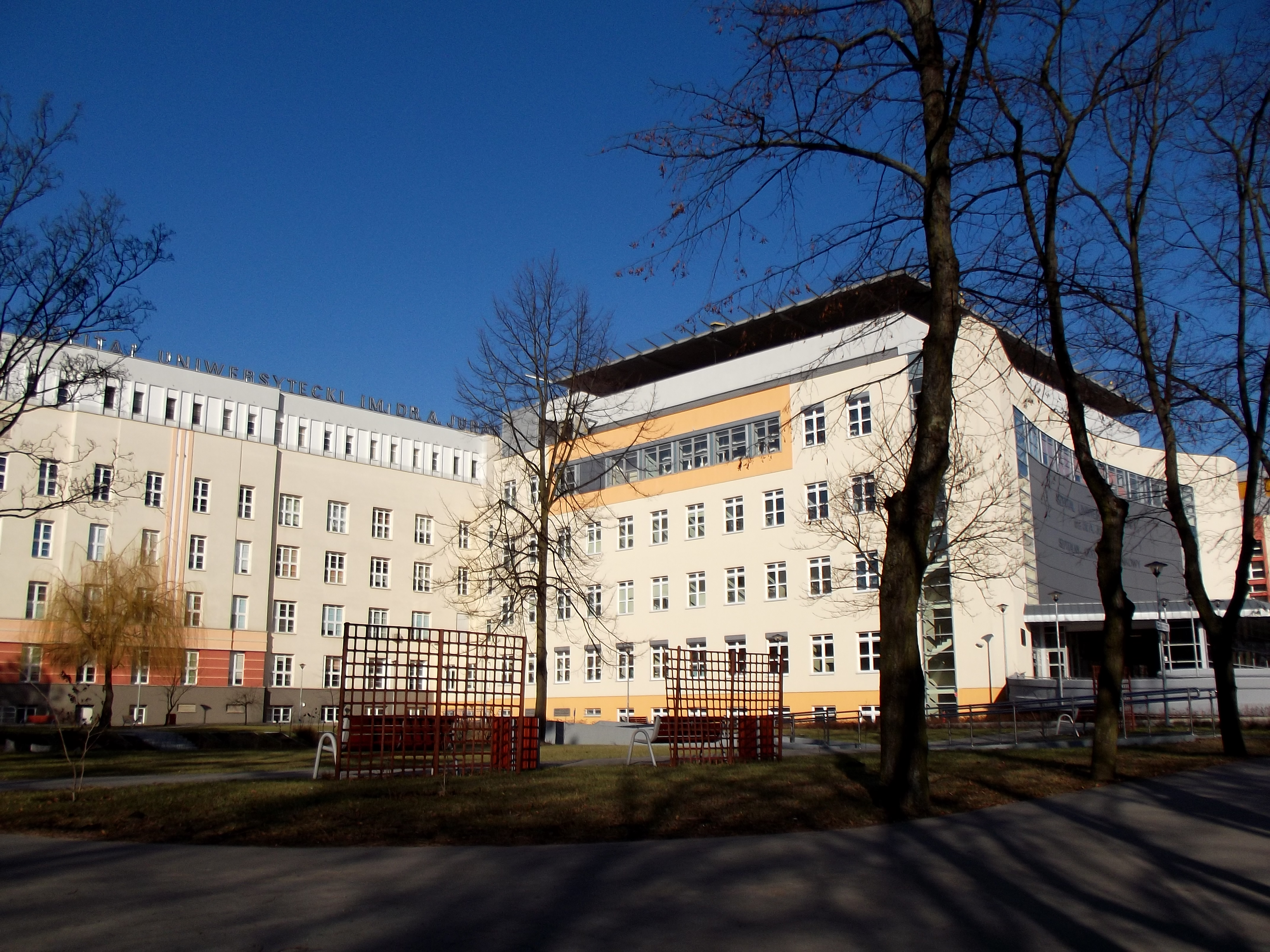 Bydgoszcz - szpital uniwersytecki im. Jurasza nr 1